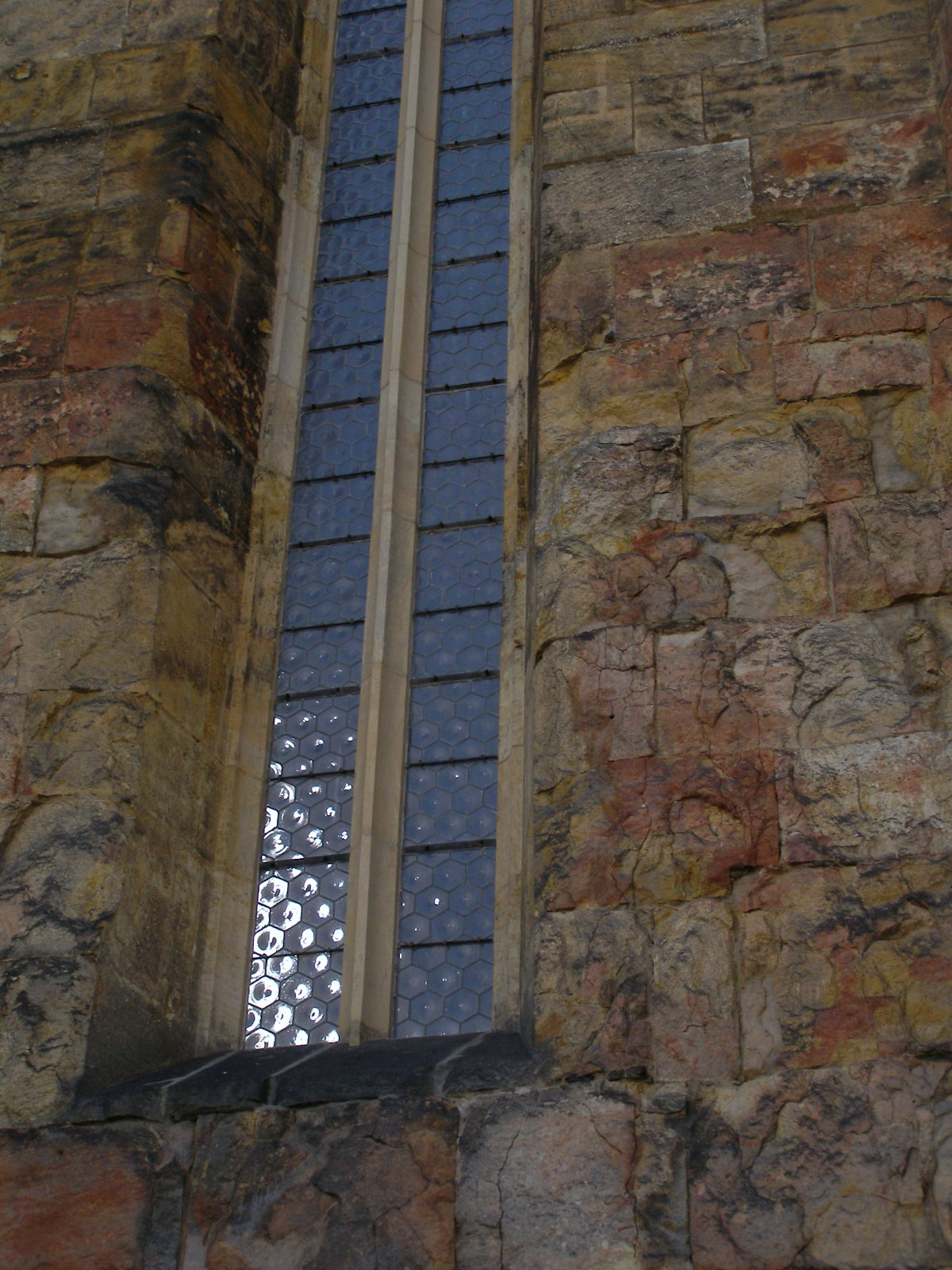 Chomutov - kostel sv. Kateřiny - detail gotického okna